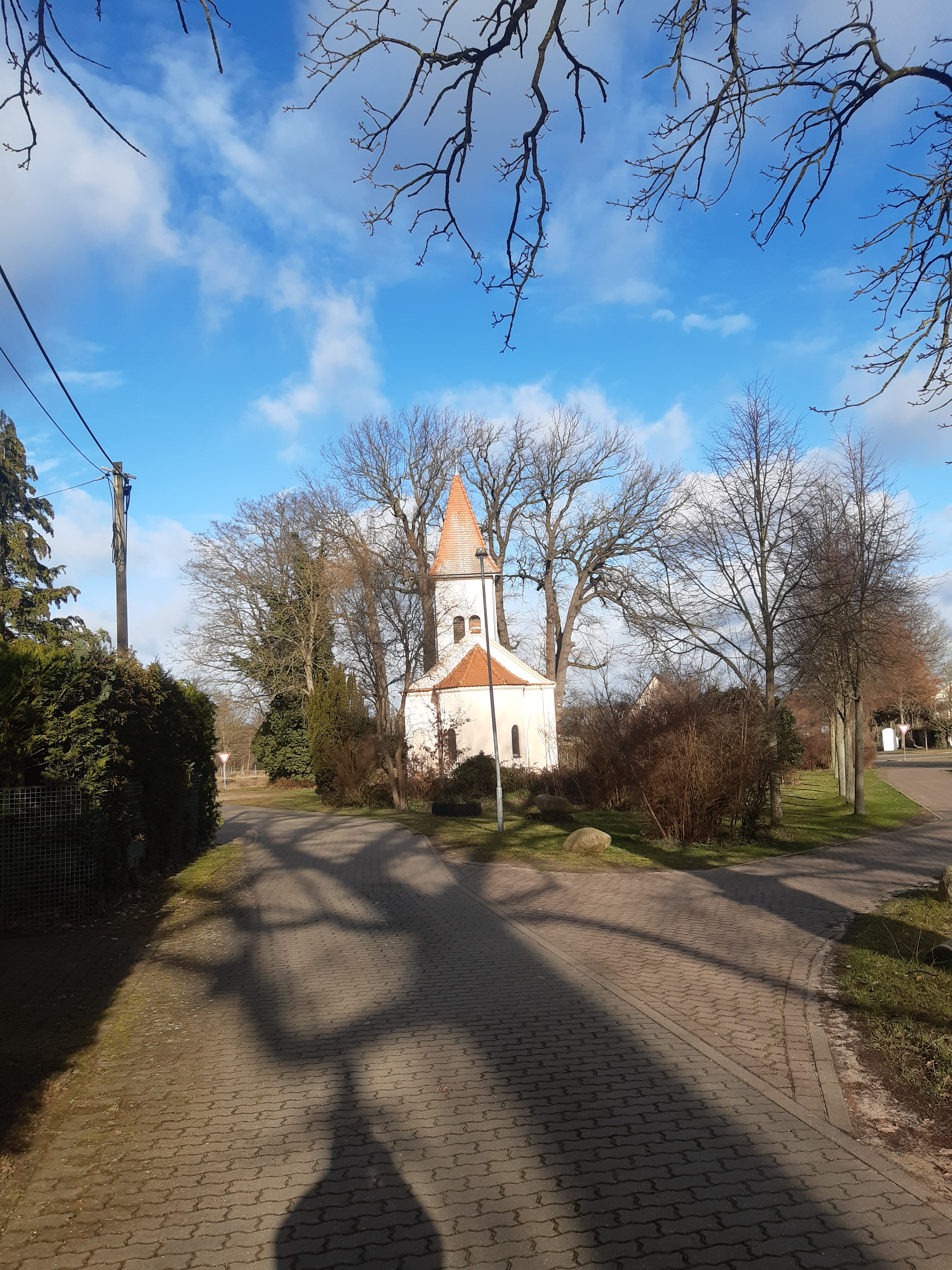 Kapelle